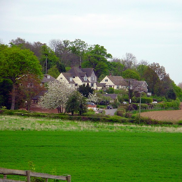 Berries Lane, Bayston Hill